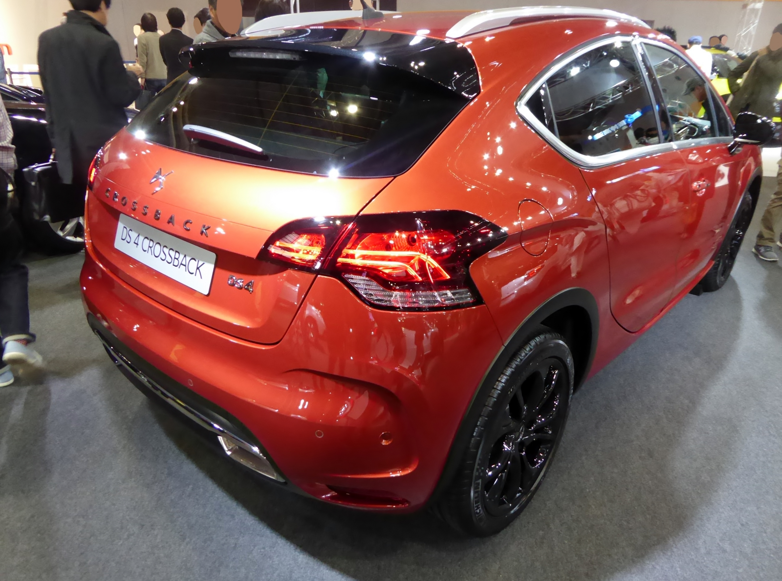 大阪モーターショー2015においてDS 4 クロスバックを撮影。